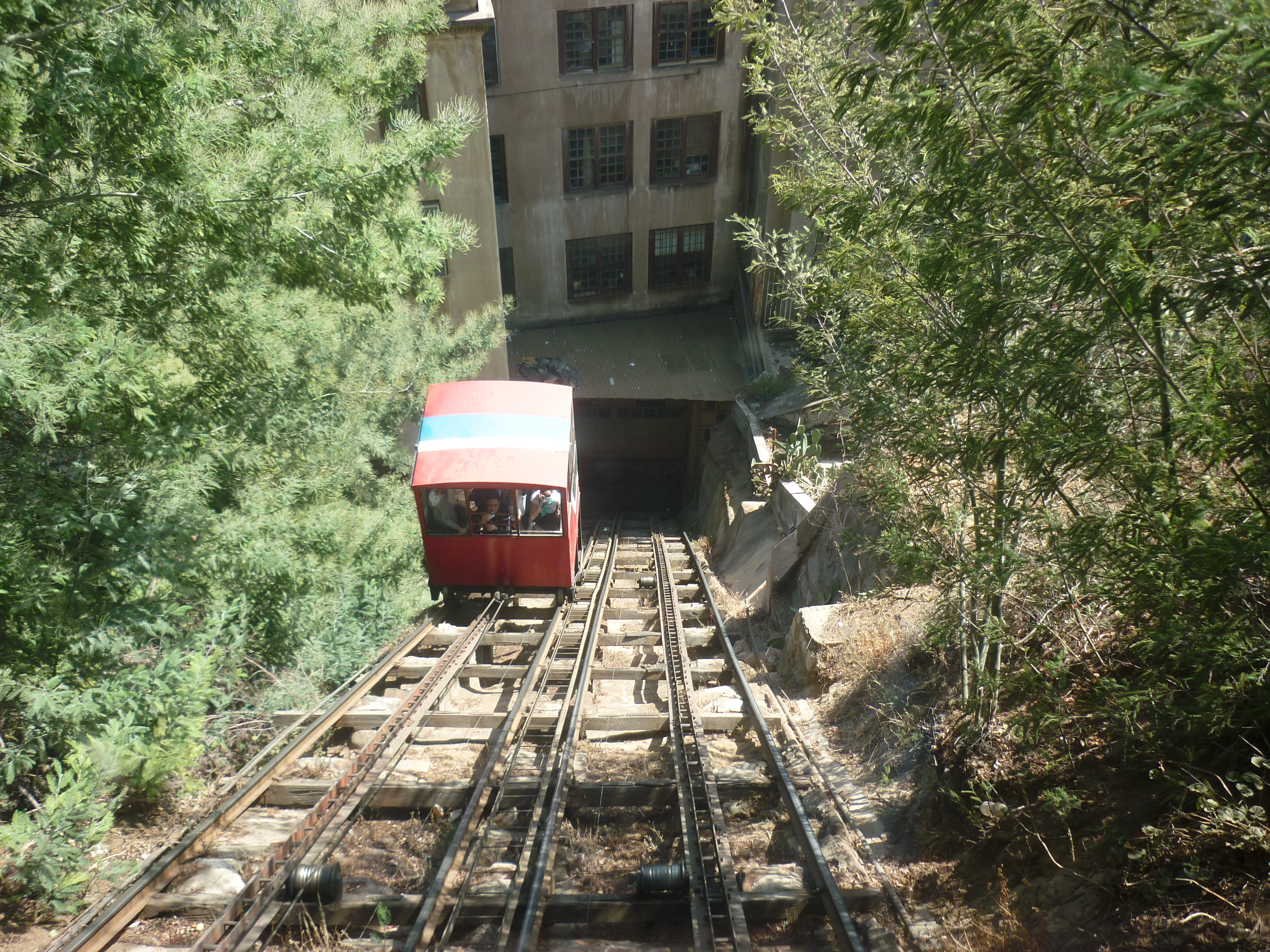 Ascensor El Peral This is a photo of a national monument in Chile: 767